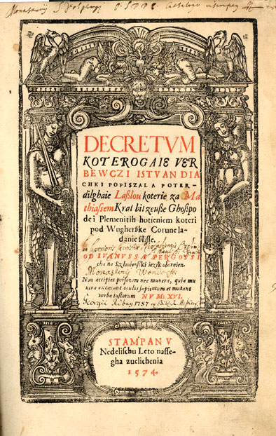 Werbőczy István Tripartitumának horvát nyelvű kiadása. Ivanuš Pergošć varasdi jegyző fordítása a kraj-horvát irodalom legrégibb nyomtatott emléke. Nyomtatta Hoffhalter Rudolf nyomdász Nedelicen 1574-ben National Széchényi Library LocationBudapestCoordinates47° 29′ 53″ N, 19° 02′ 14″ E Established1802Website control : Q1063819 VIAF: 157919295 ISNI: 0000 0001 1781 8798 ULAN: 500306655 NLA: 35722893 GND: 1007496-X Accession number: RMK II 136